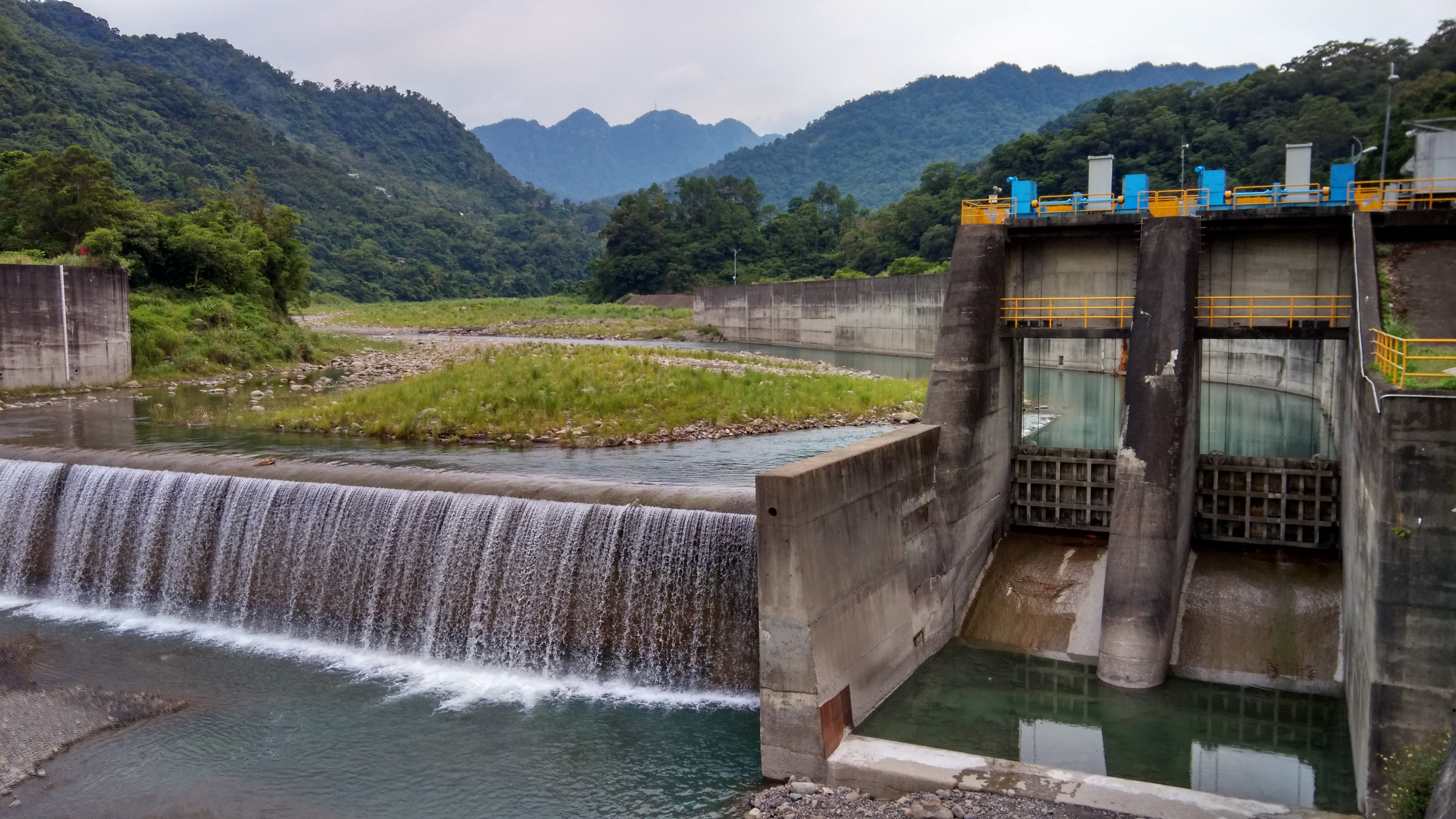 中文（台灣）: 上坪攔河堰與進水口